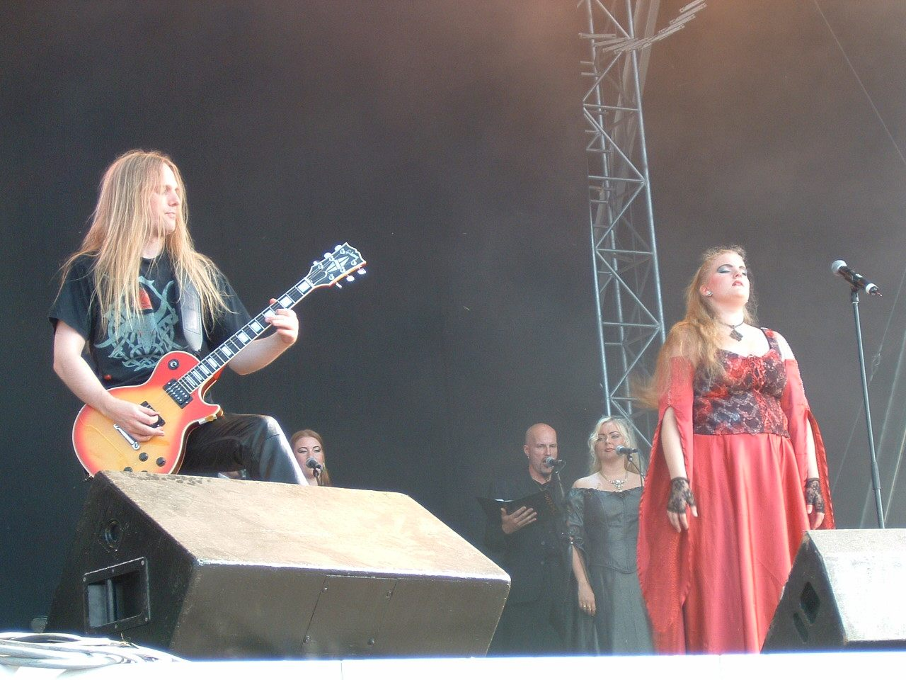 Christofer Johnsson and singer Karin Fjellander 2004 M'era Luna Festival